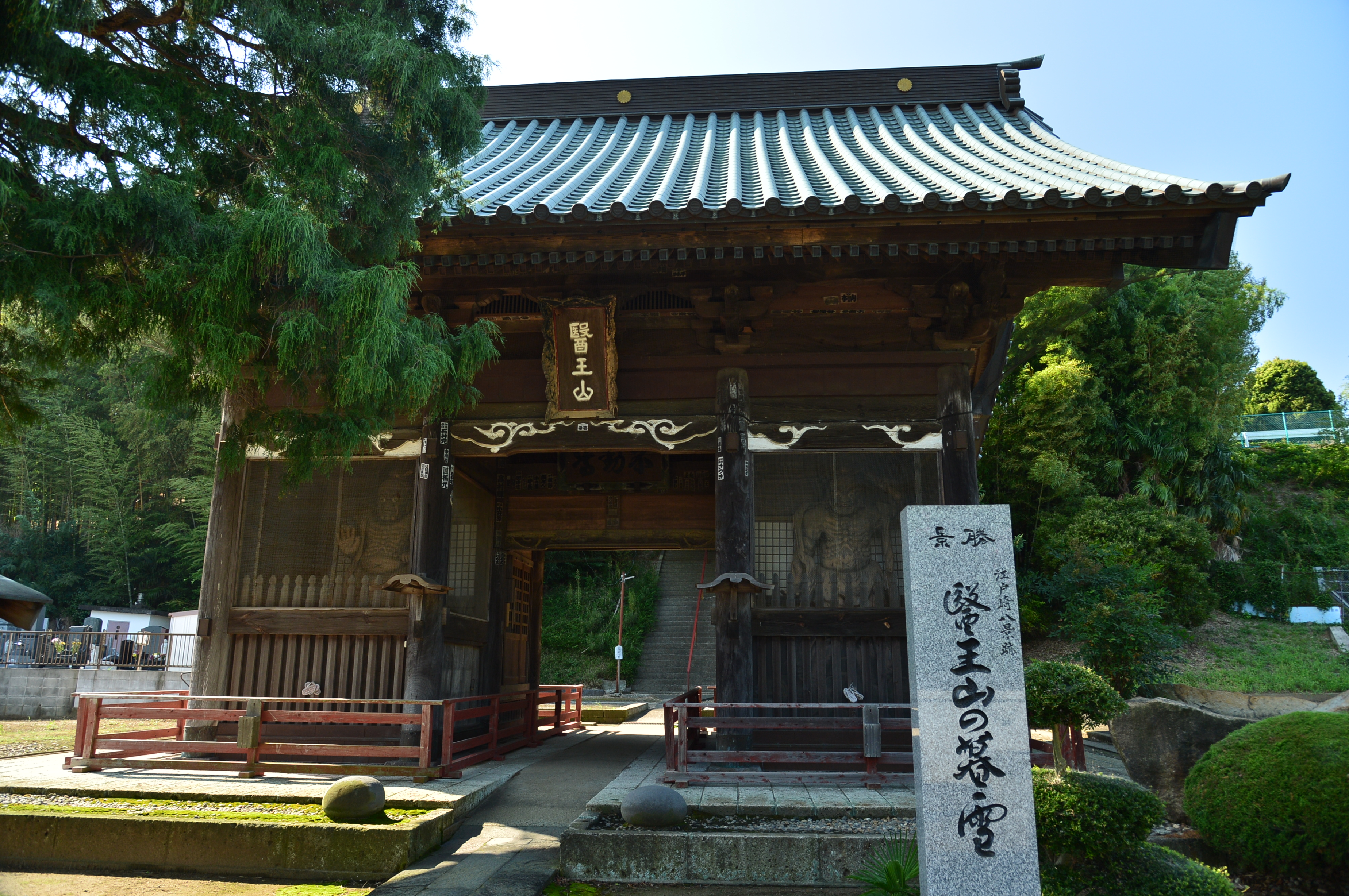 江戸崎不動尊院の仁王門（茨城県稲敷市）